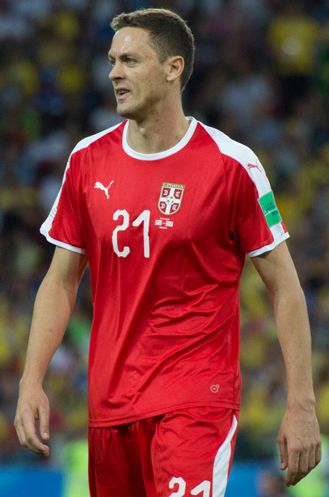 Сборная Бразилии оставляет Сербию за бортом ЧМ-2018 и выходит в плей-офф